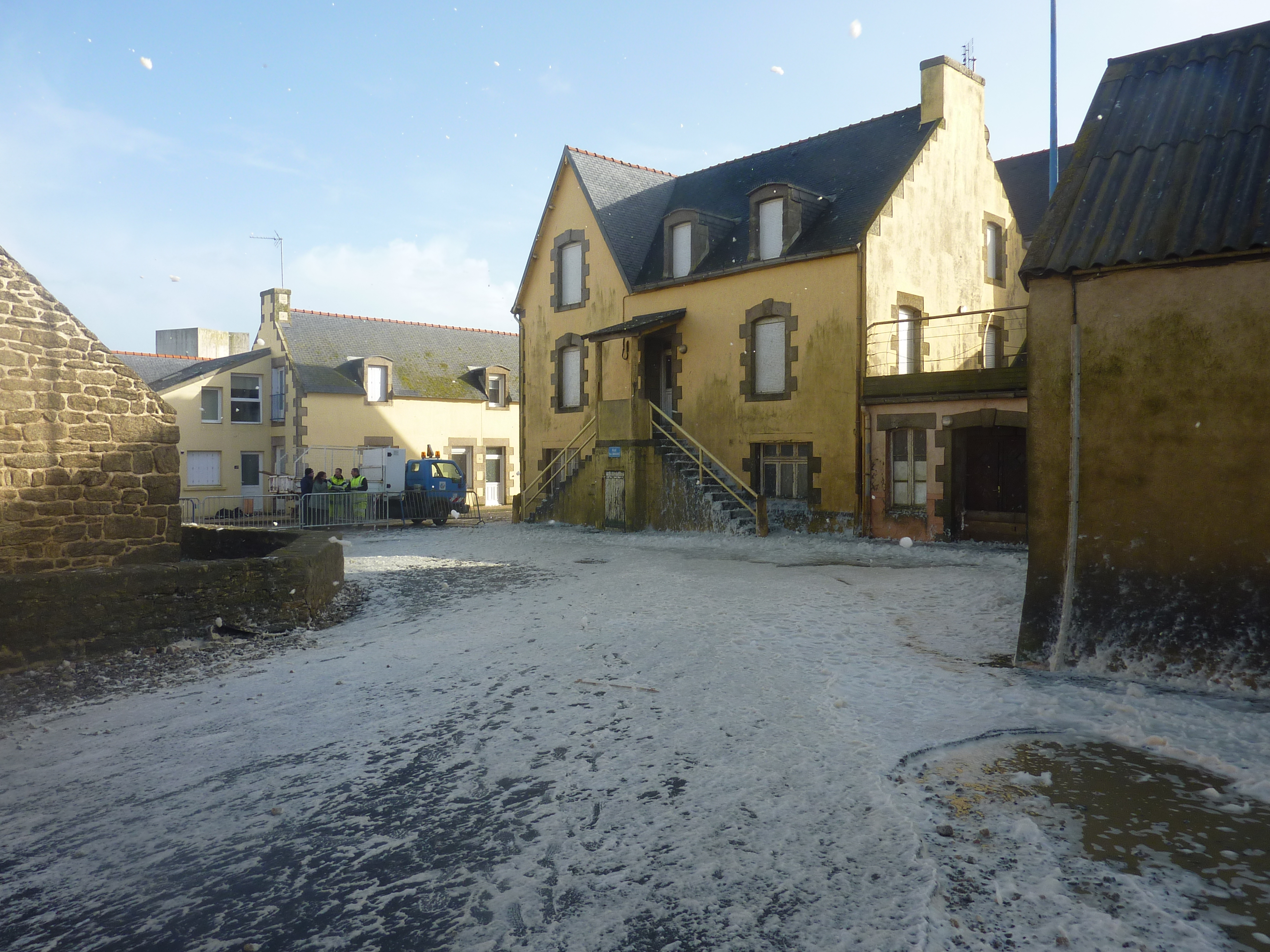 Penmarch : la tempête du 5 février 2014 : écume de mer ayant envahi les rues du port lui donnant l'aspect d'un paysage enneigé.